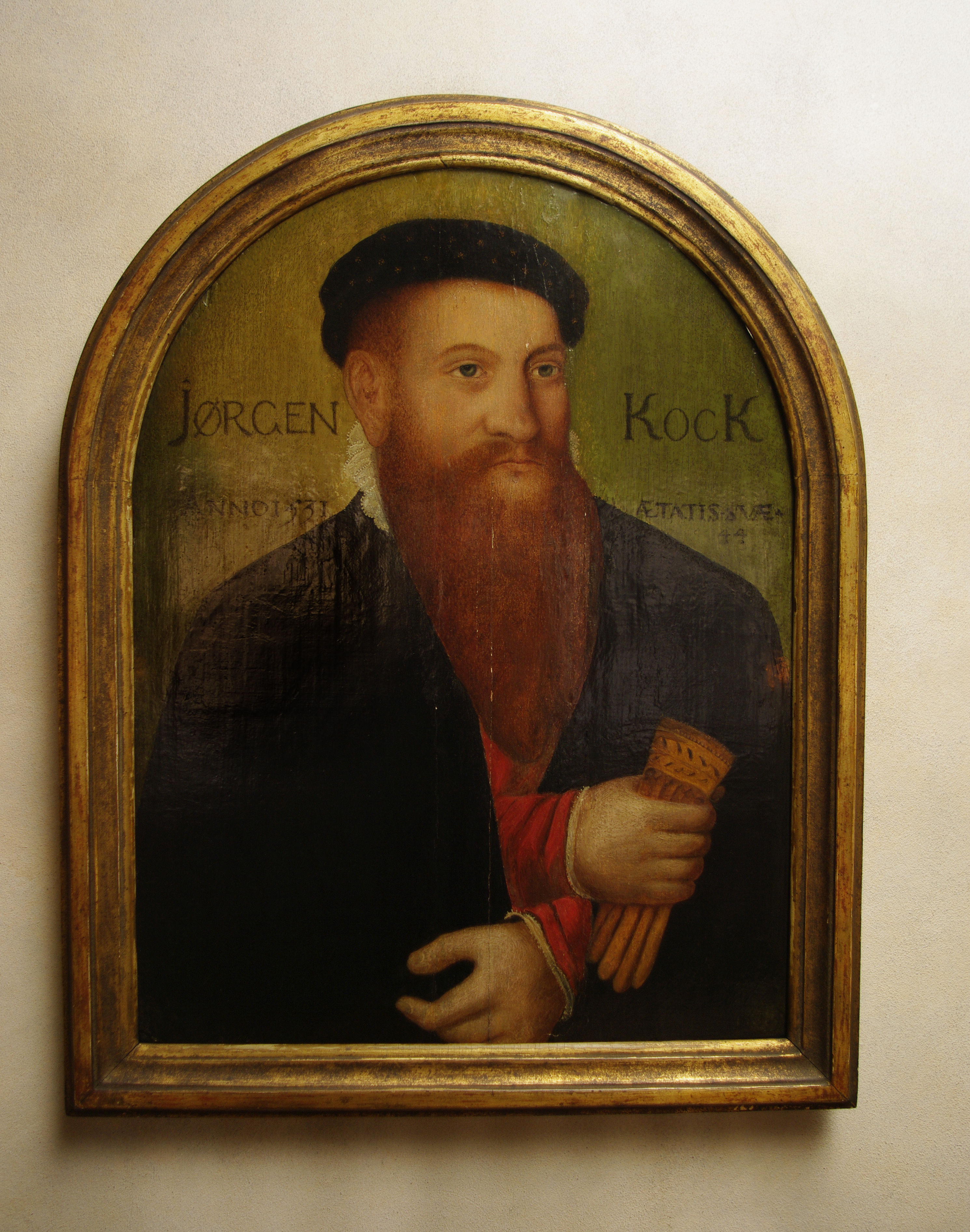 Borgmästaren Jörgen Kocks porträtt 1531.